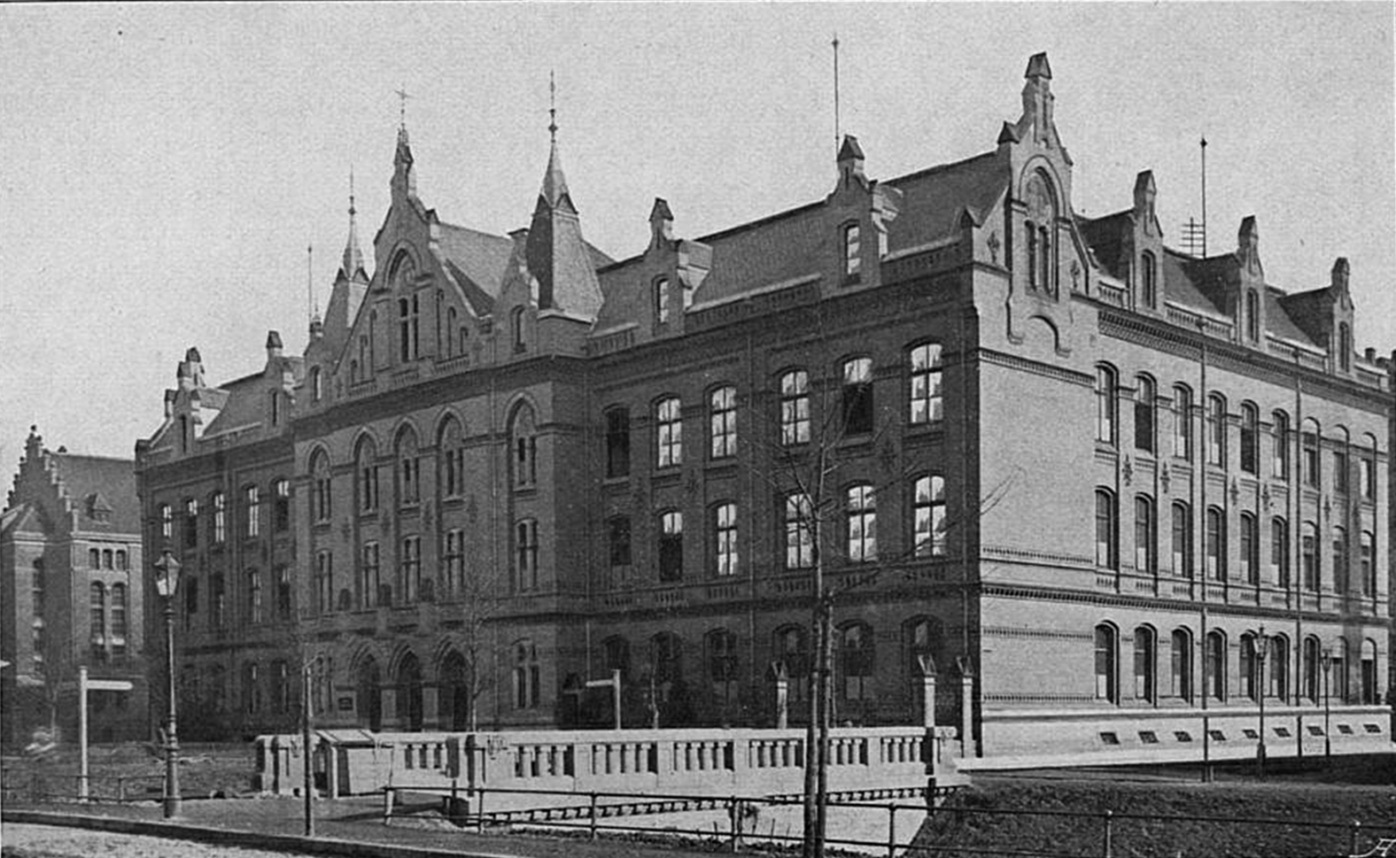 Düsseldorf, Prinz-Georg-Straße 80, Schulgebäude des Königlichen Prinz-Georg-Gymnasiums, um 1907, vormals Städtische Realschule, erbaut 1896